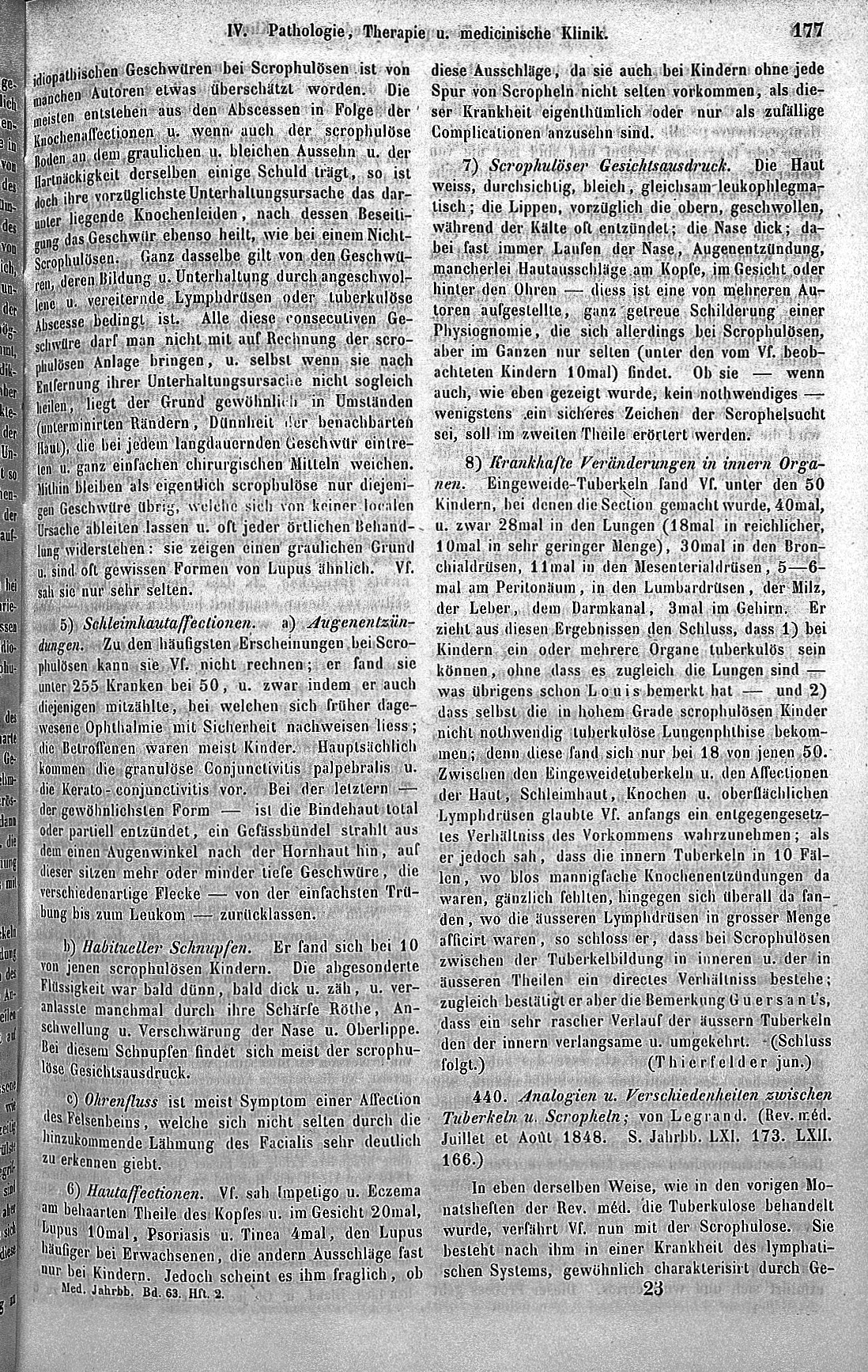 SCHMIDT, Carl Christian C.C. Schmidt, Jahrbucher der In- und Auslandischen Gesammten Medicin. Leipzig: Druck und Verlag von Otto Wigand, 1849. Text p.177 Rare Books Keywords: schmidt, carl christian; Medicine; annual; epb